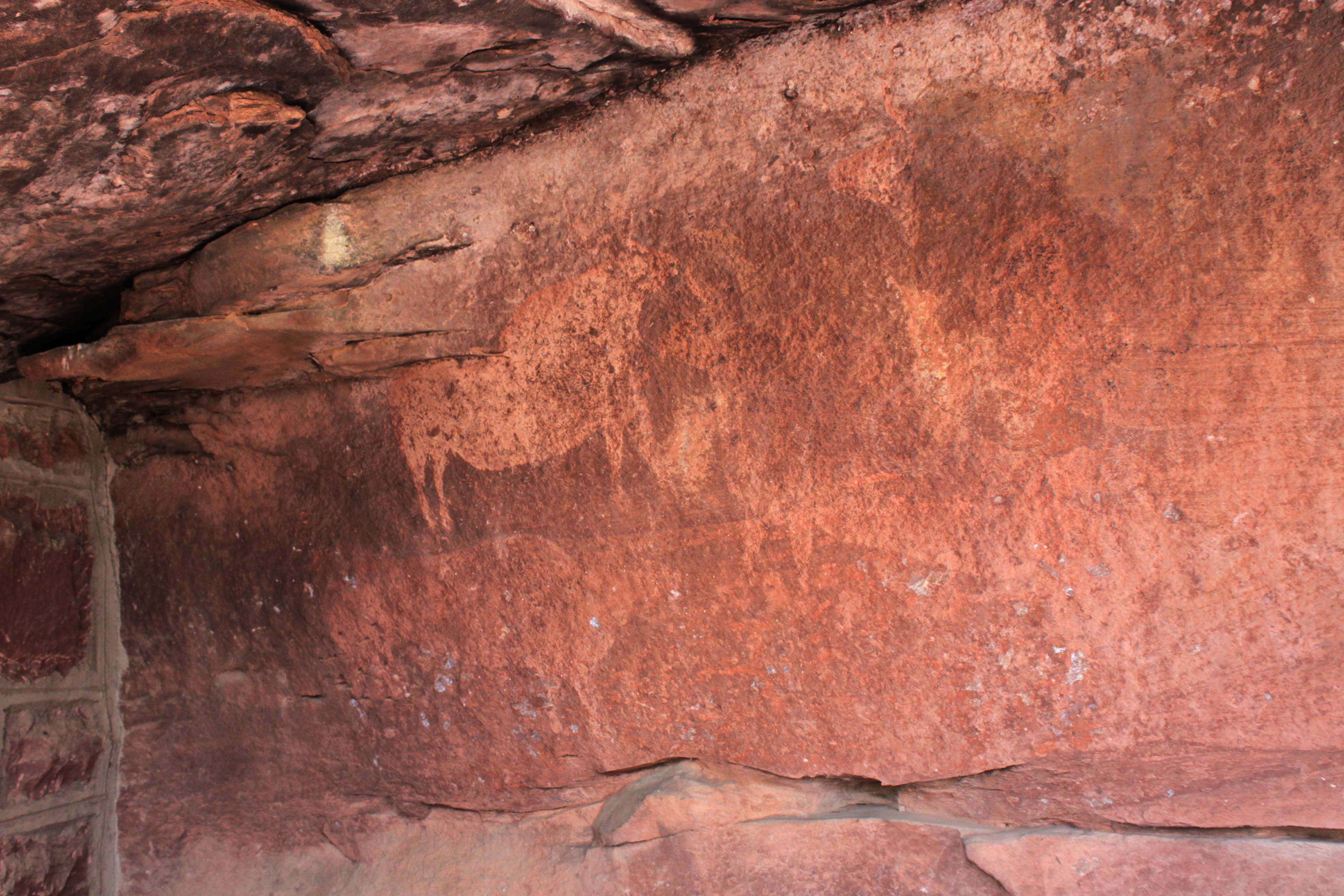 Abrigo de Cocinilla del Obispo situado en la Sierra del Rodeno en el término municipal de Albarracín, Teruel, España.